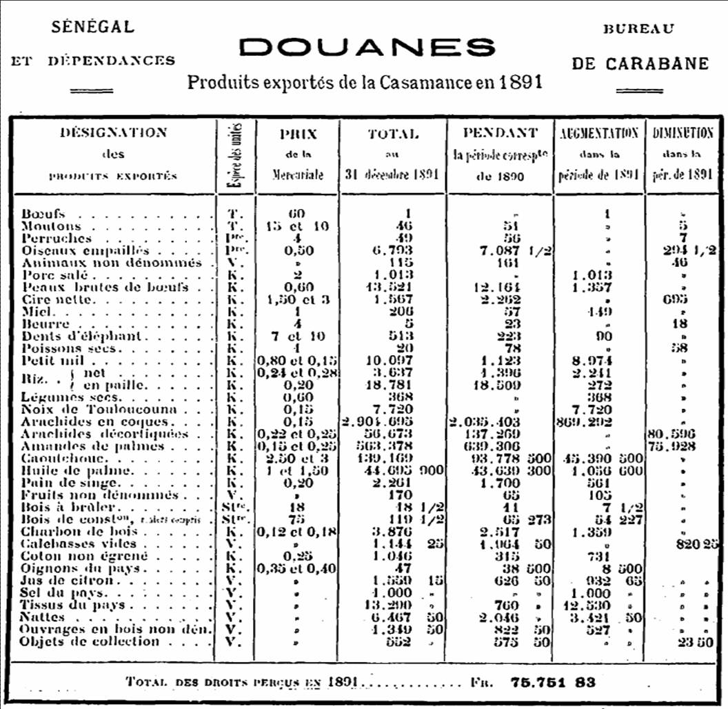 Bureau des douanes de Carabane (Casamance, Sénégal) : Tableau officiel des produits exportés de la Casamance en 1891